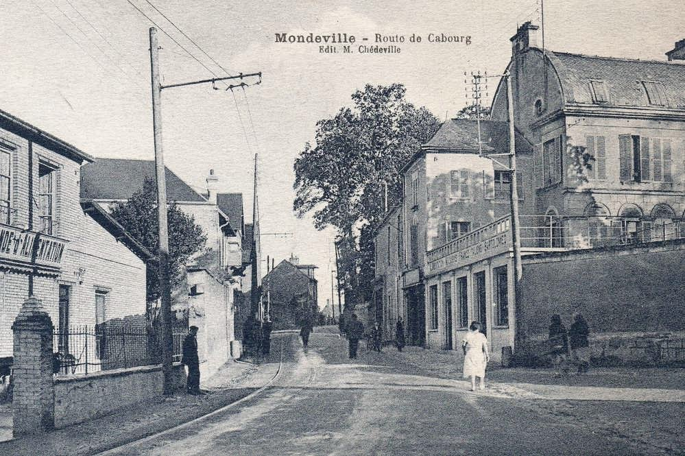 voie du tramway, jamais mis en service, dans le hameau de Clopée à Mondeville dans la banlieue de Caen.